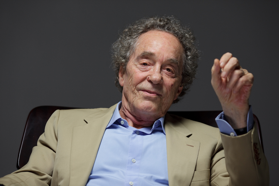 Foto tirada em 29/04/2010 pelo Garapa - Coletivo Multimídia ( André Midani em entrevista ao projeto Produção Cultural no Brasil: André Midani é produtor musical.